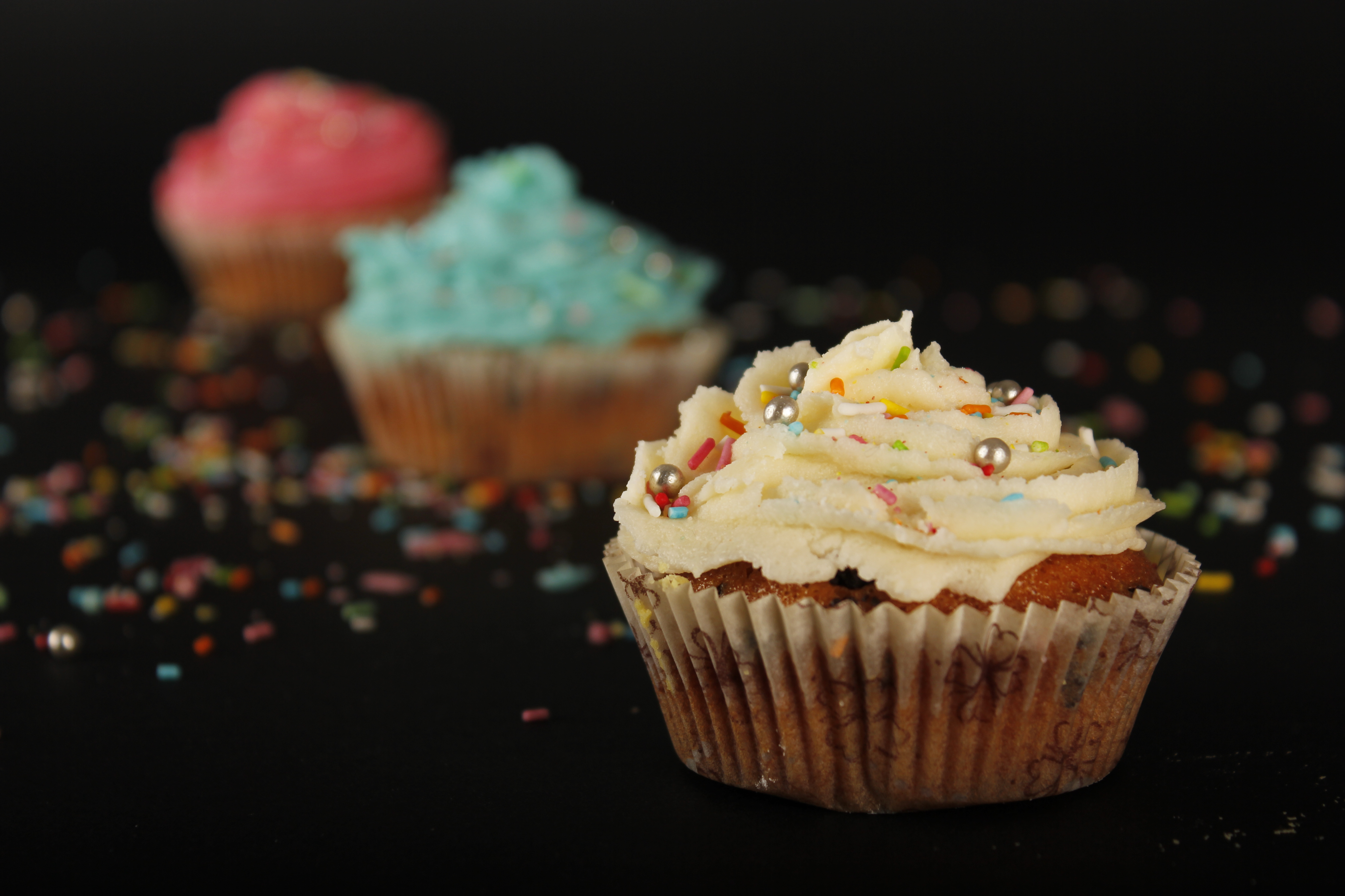 Messa a fuoco soggetto in primo piano con diaframma f5.6